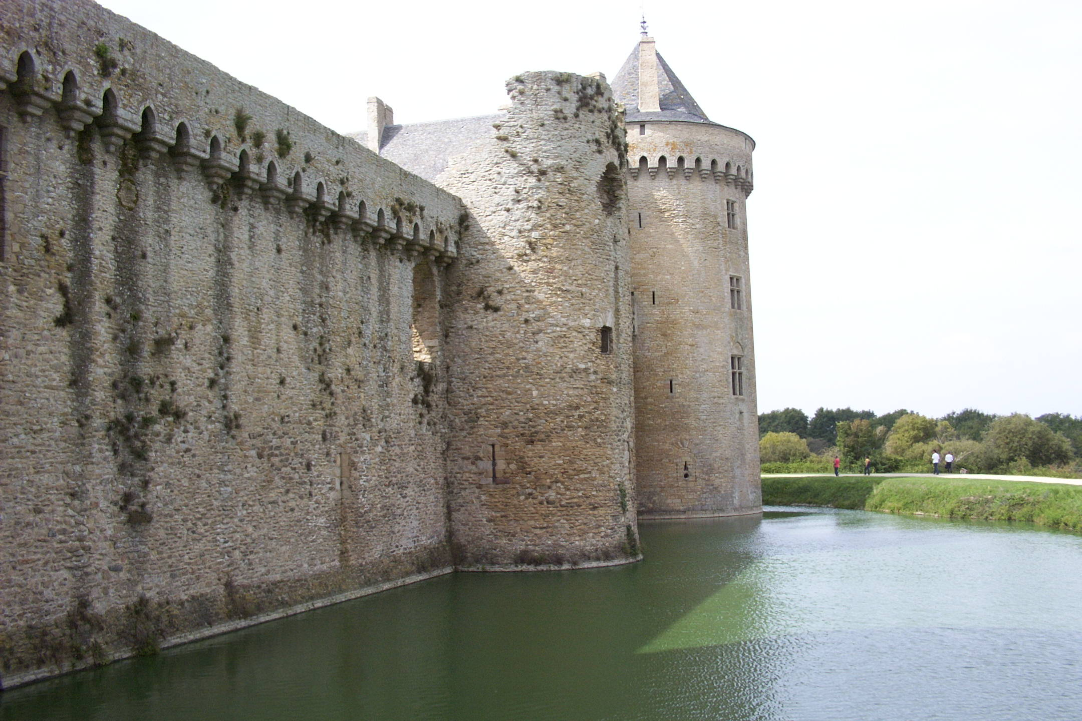 Wasserschloß Suscinio